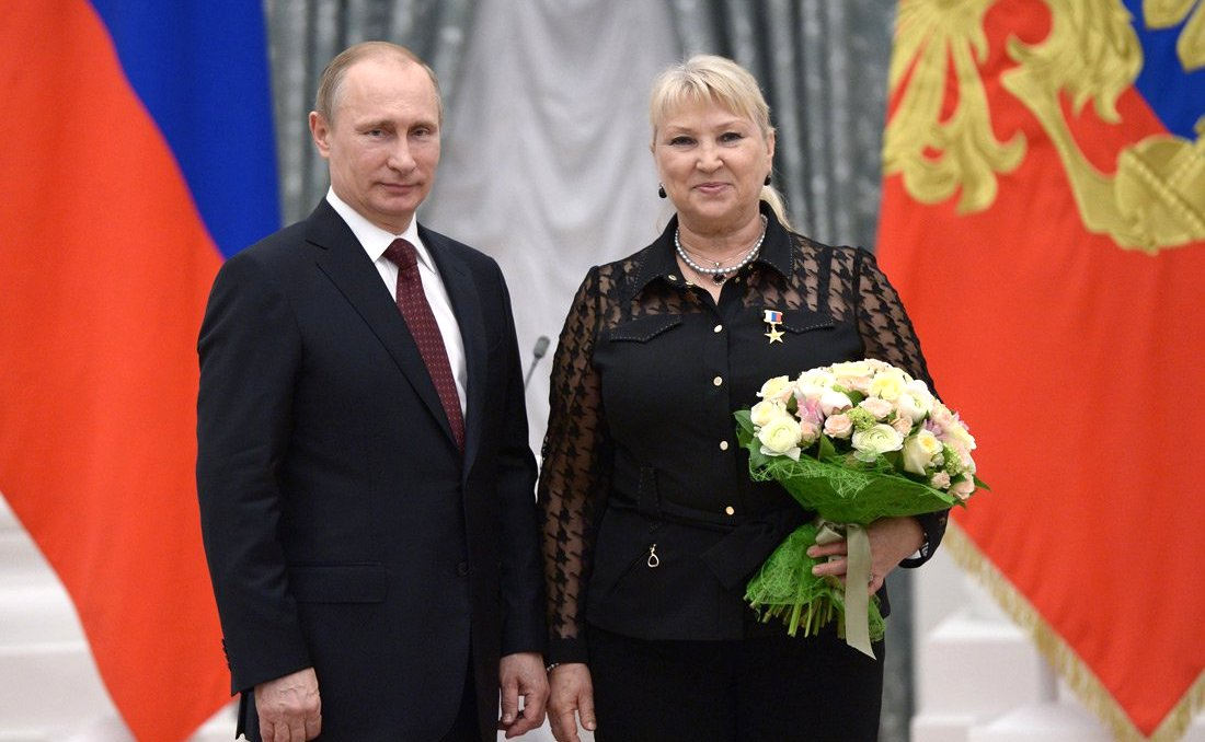 Москва, Кремль. 1 мая 2014 года. Церемония награждения Героев Труда Российской Федерации. Званием Героя Труда РФ награждена спортивный тренер Татьяна Покровская